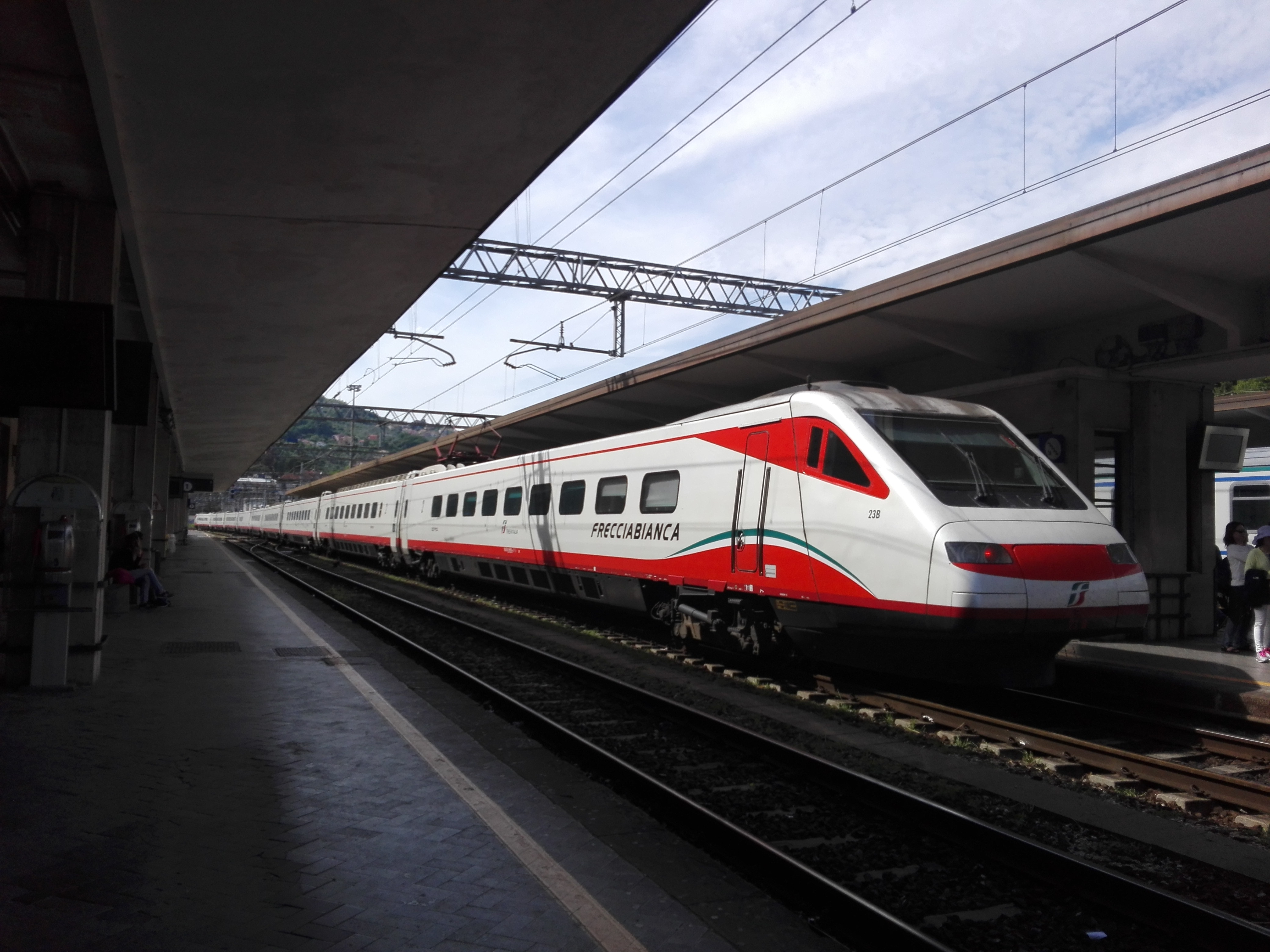 ETR 460 in livrea Frecciabianca espleta il servizio FB8616 (Roma Termini-Genova Piazza Principe). Qui in partenza dalla stazione di La Spezia Centrale.